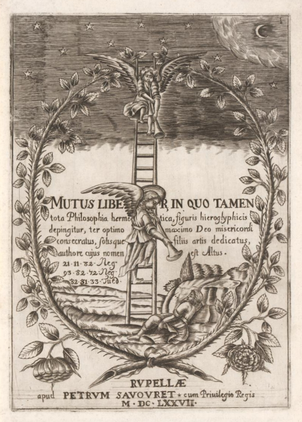 Portada Mutus Liber, Isaac Baulot, La Rochelle, 1677